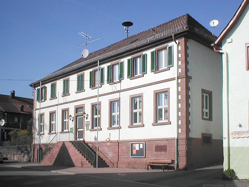 Rathaus von Mosbach-Lohrbach, Baden-Württemberg, Deutschland